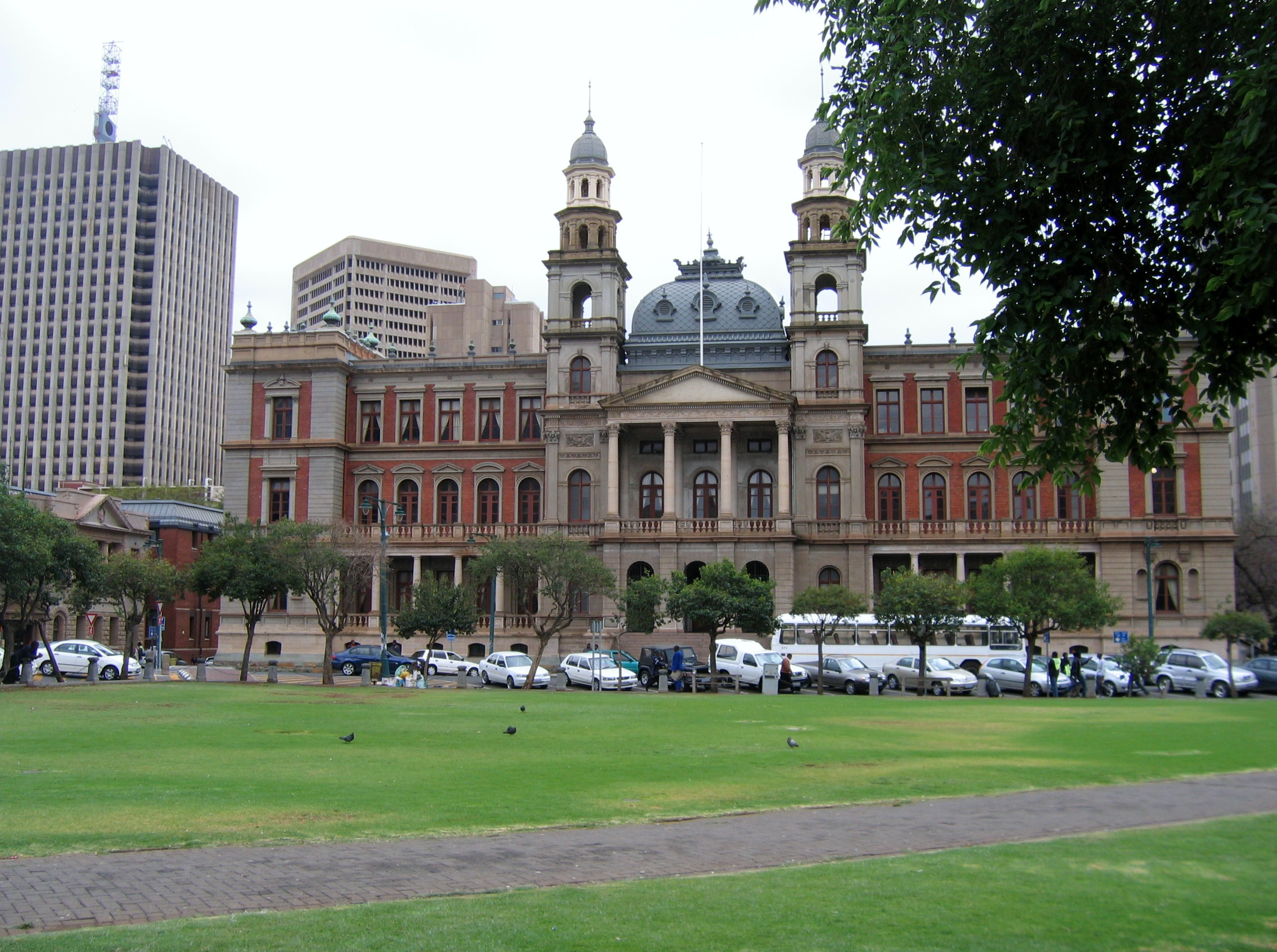 Pretoria Afrique_australe au Afrique du Sud